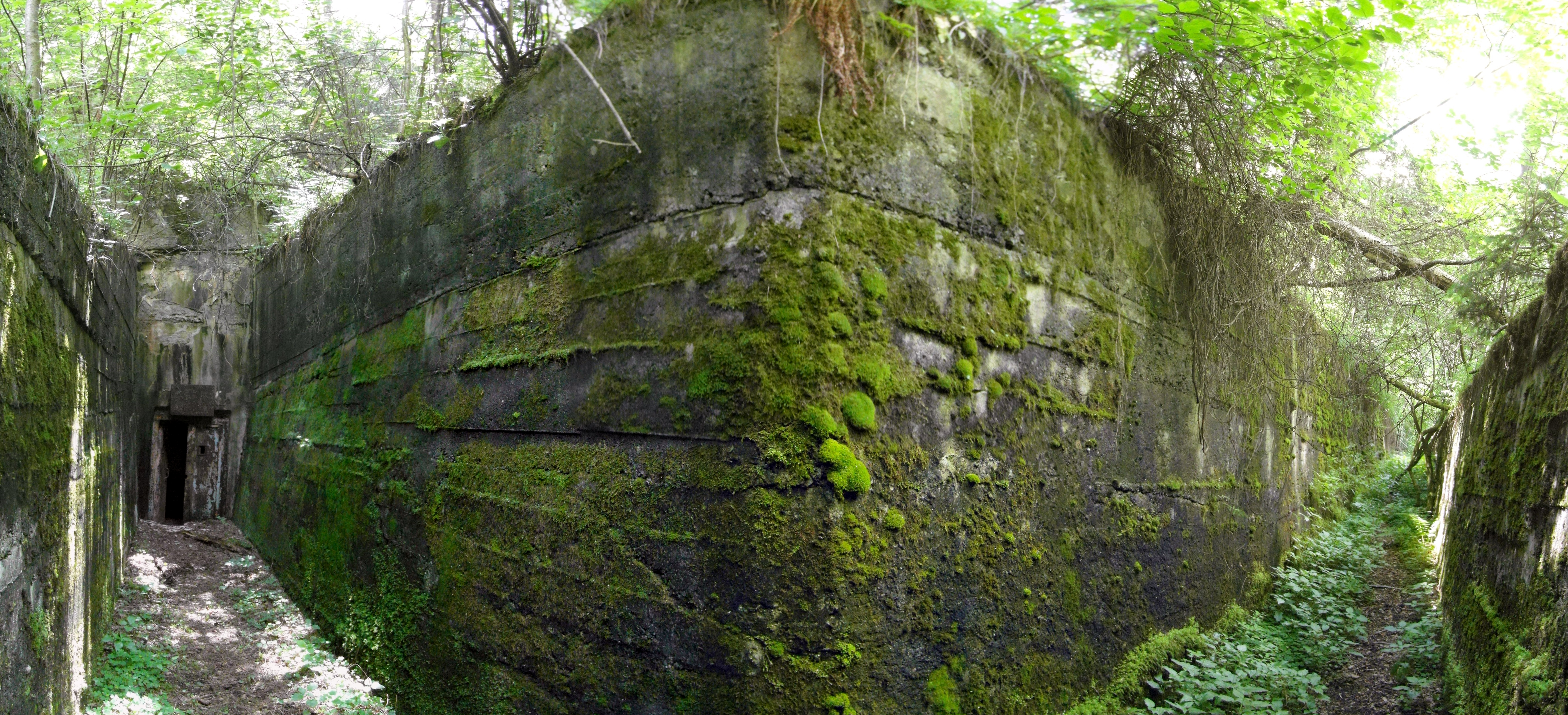 Opera 5 Chiusa di Rio di Pusteria